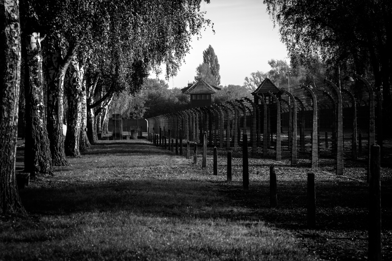 auschwitz, prison camp, poland